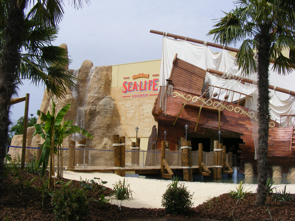 Entrata della struttura Sea Life Aquarium in Italia